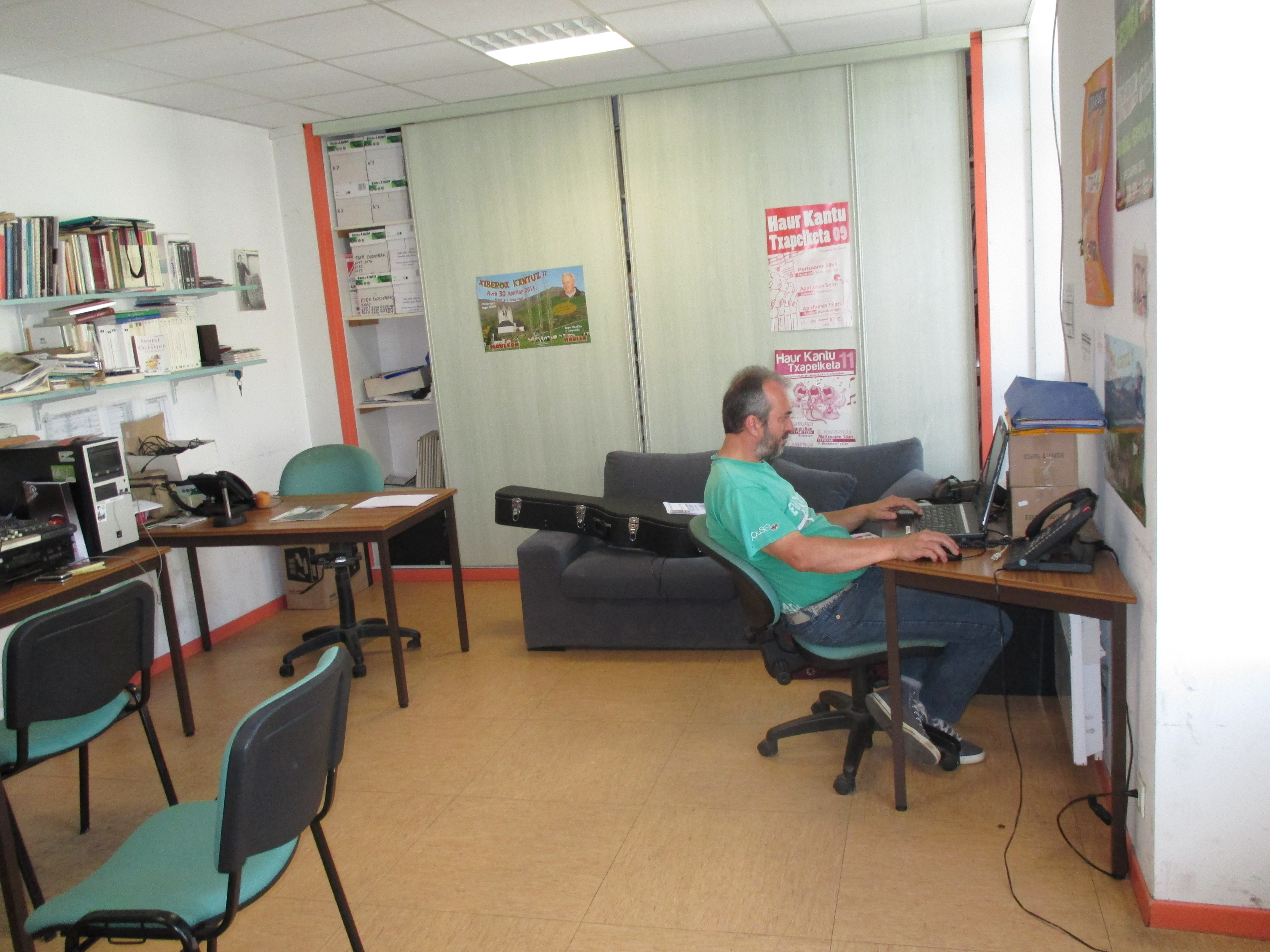 Laurent Etxegoin "LOL", kazetari zuberotarra, Xiberoko Botza emisoran (Maule).